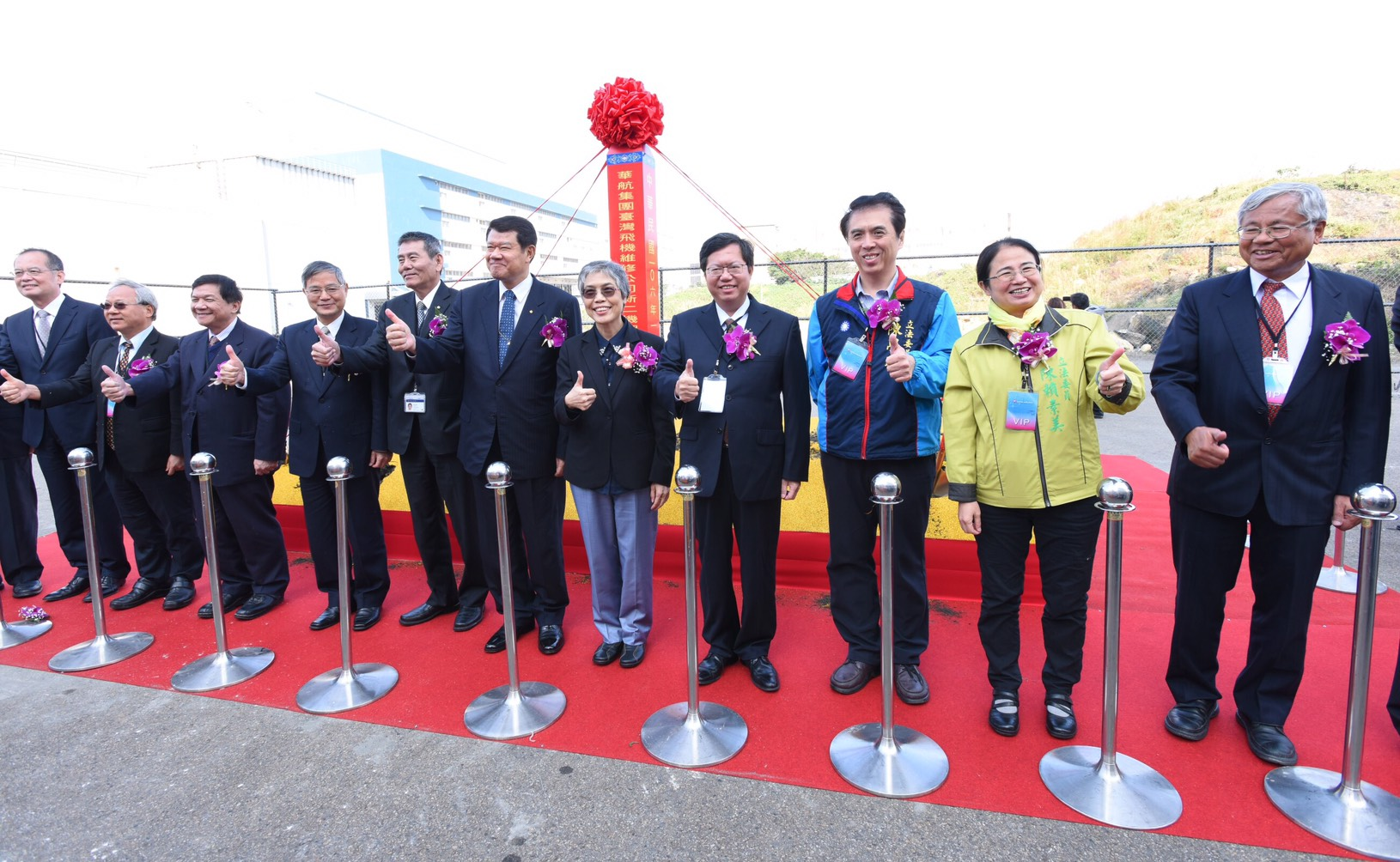 中文（台灣）: 台灣飛機修護公司新2機棚廠新建工程動土典禮照片